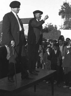 Bertsolariak